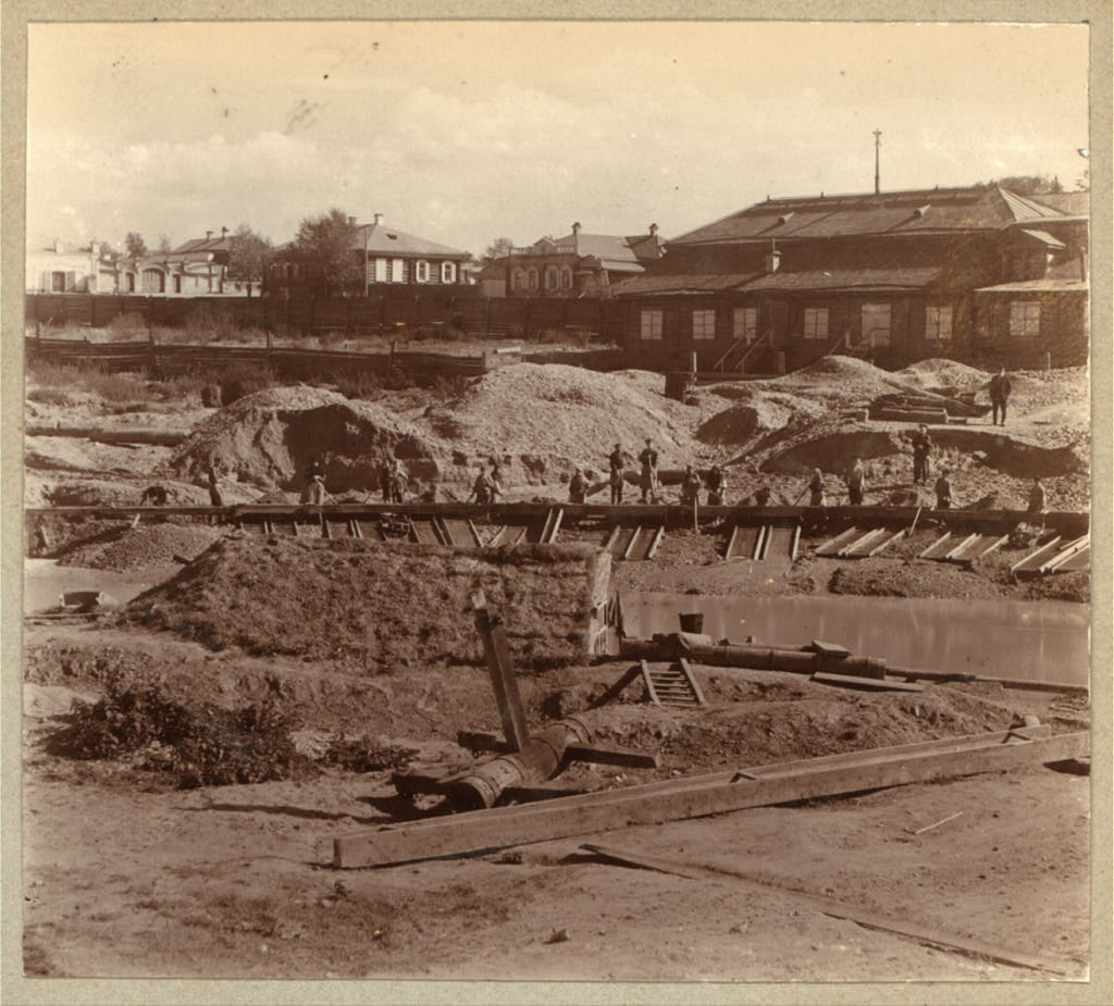 TITLE: Staratel'skīia raboty okolo Berezovskago prīiska. [Berezovski] TITLE TRANSLATION: Gold-prospecting work near the Berezovskii mine. [Berezovski]